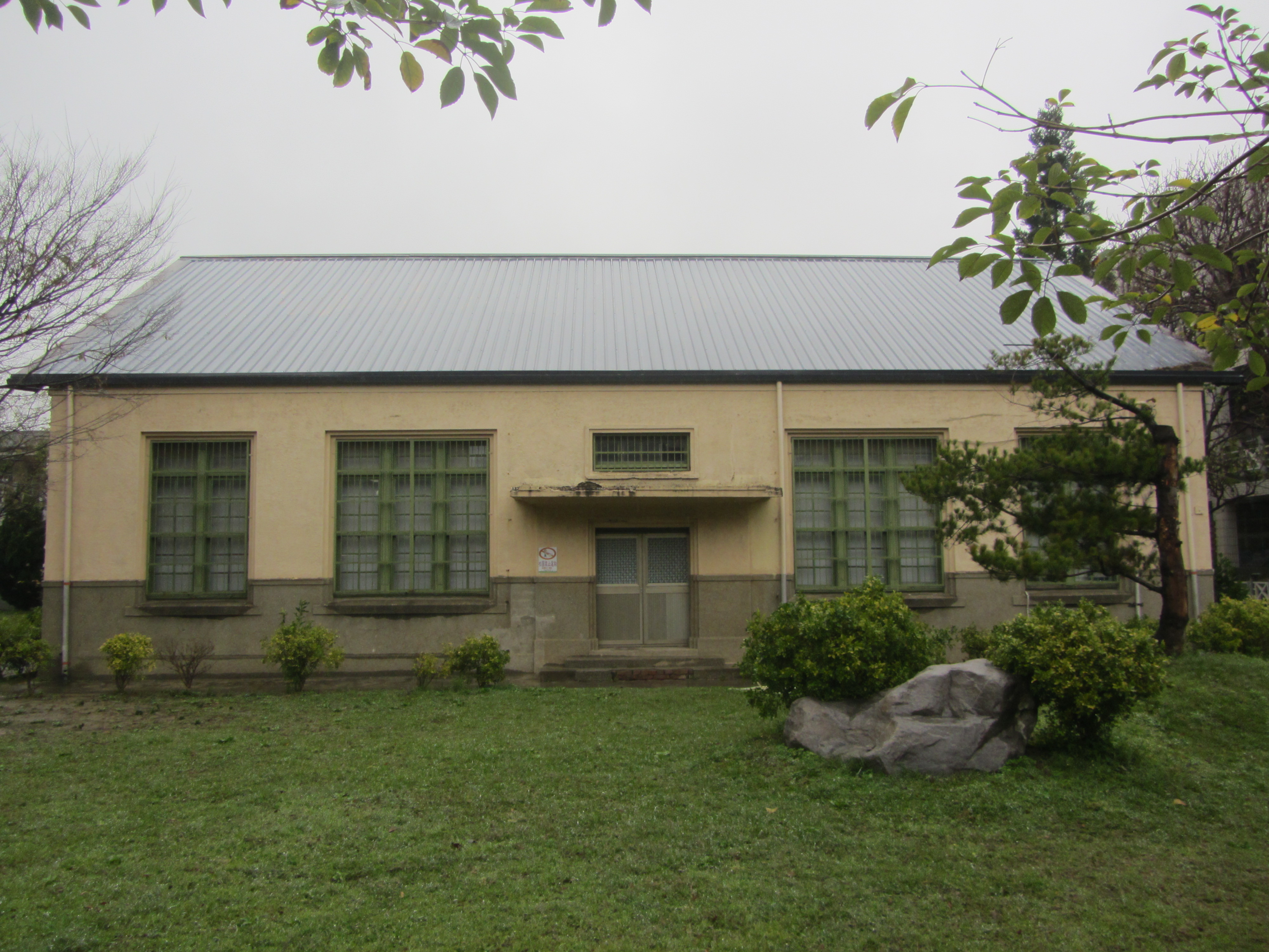 苗栗縣立竹南國民中學內的苗栗縣歷史建築「尋常小學校禮堂」